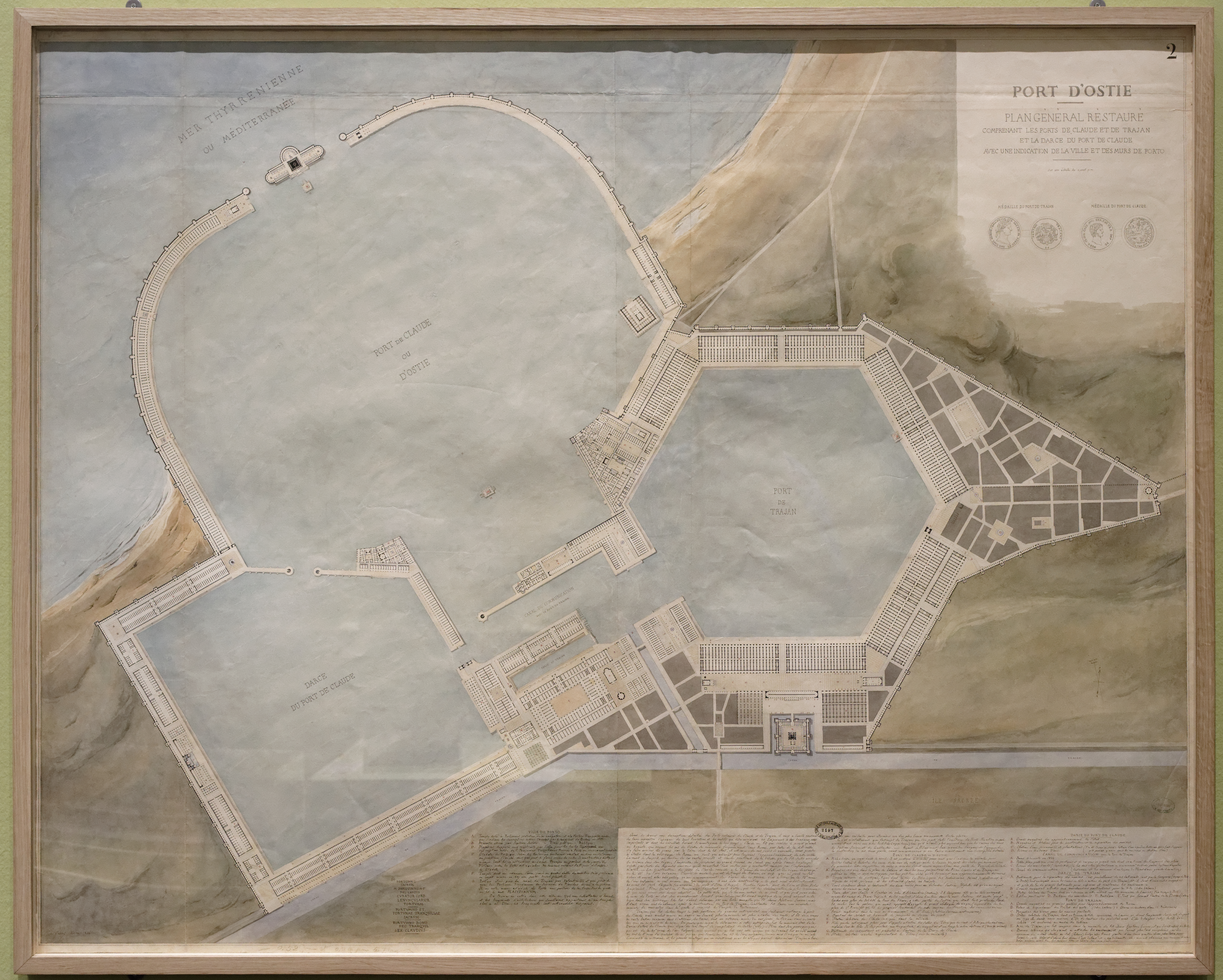 Port d'Ostie, plan général restauré, dessiné par Pierre-Joseph Garrez en 1834 Format 105 x 131,5 cm. Exposée durant l'exposition Claude, un empereur au destin singulier au MBA Lyon. catalogue p. 247. Conservée au Beaux-Arts de Paris, Env 27-02